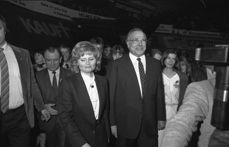 21.2.1983 Wahlkundgebung der CDU in der Kölner Sporthalle